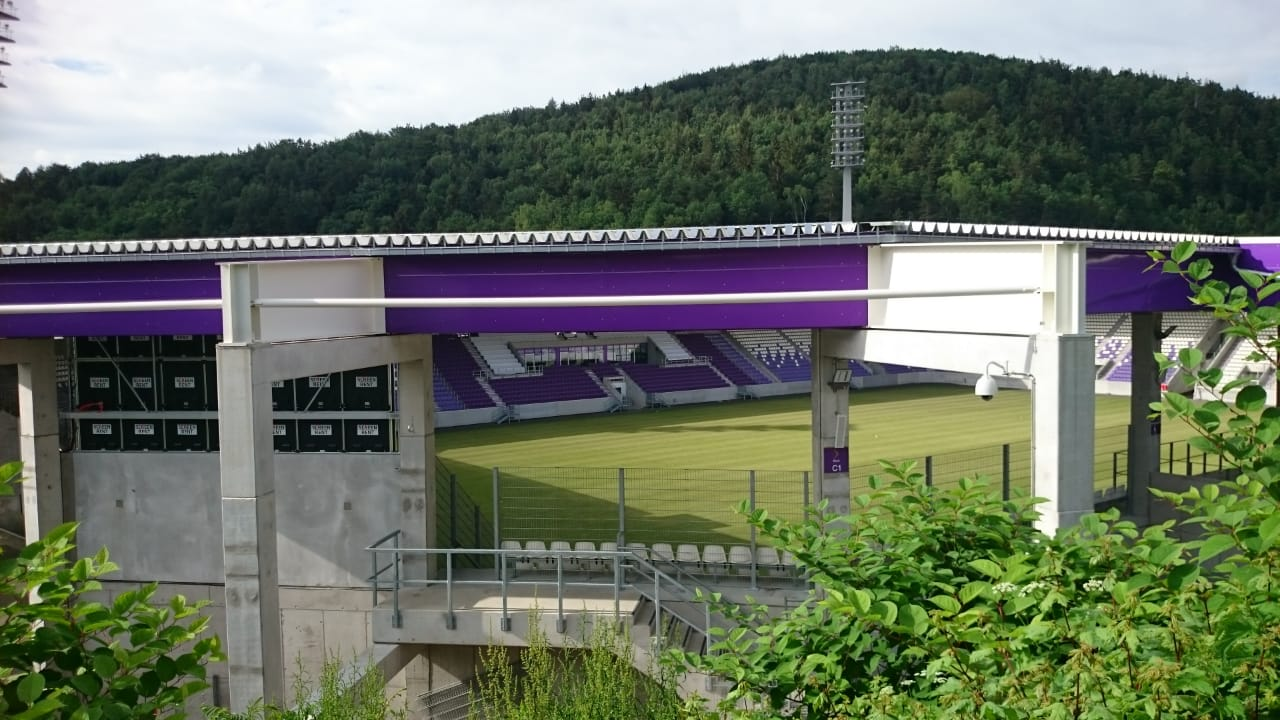 Erzgebirgsstadion Aue